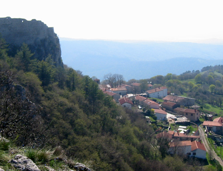 Socerb, village in Slovenia photo:Ziga 12:03, 16 April 2007 (UTC)